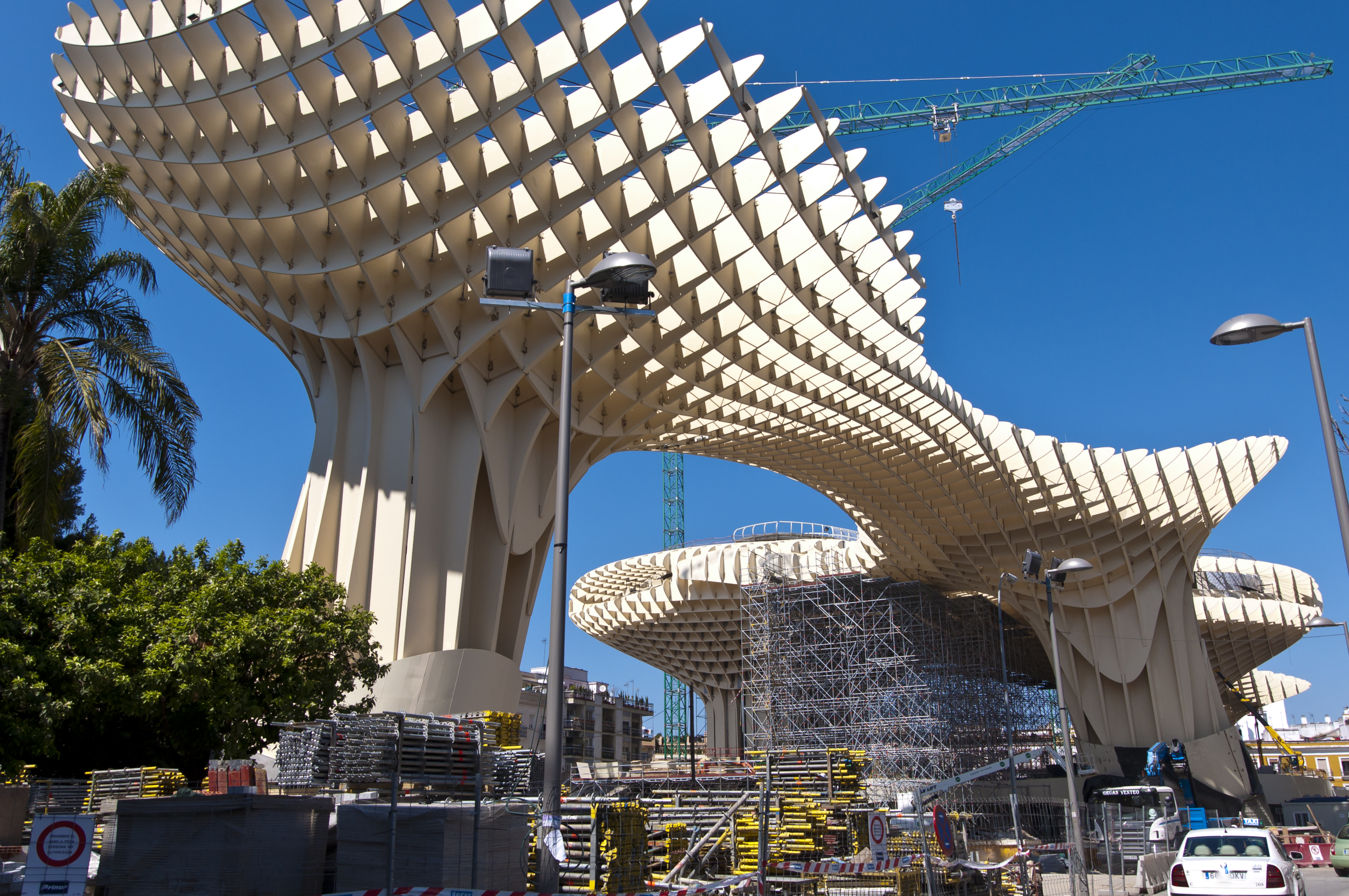 Metropol Parasol in Sevilla